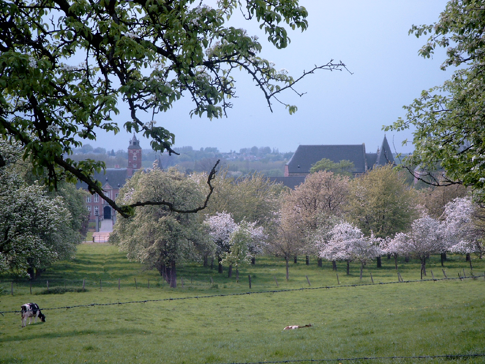 Algemeen zicht op complex Alden Biesen gezien vanuit het oosten